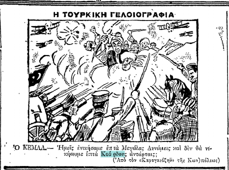 Κοινό κτήμα (Public Domain)